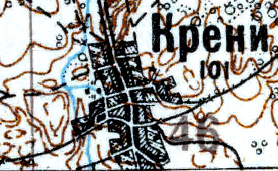 Топографическая карта Ленинградской области, квадрат VIc-28 (Луга), деревня Крени